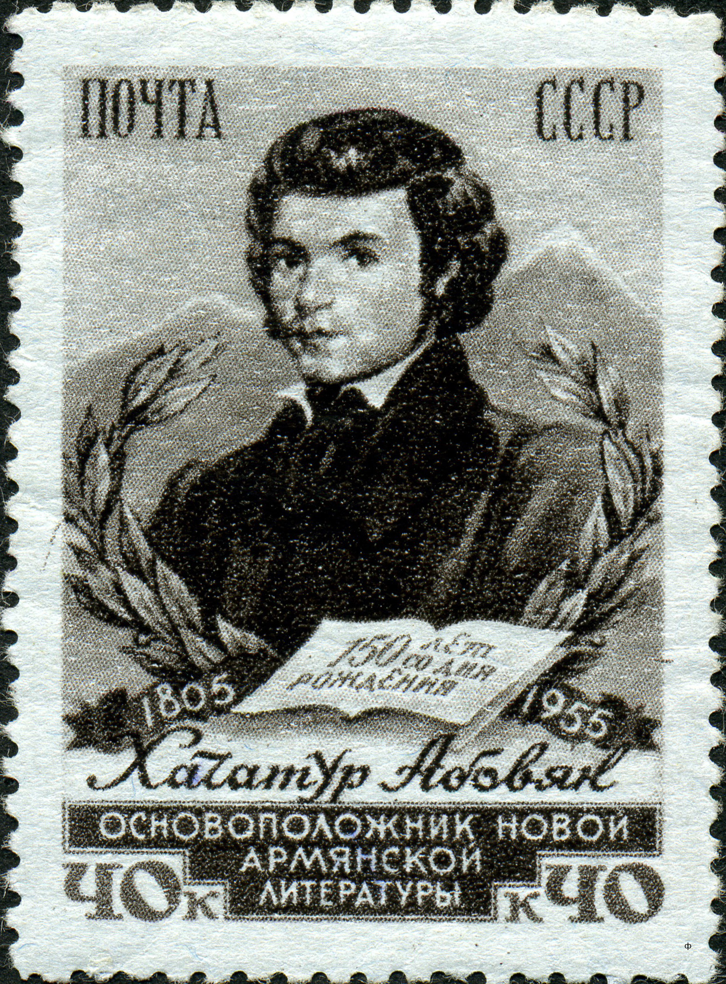 Марка СССР